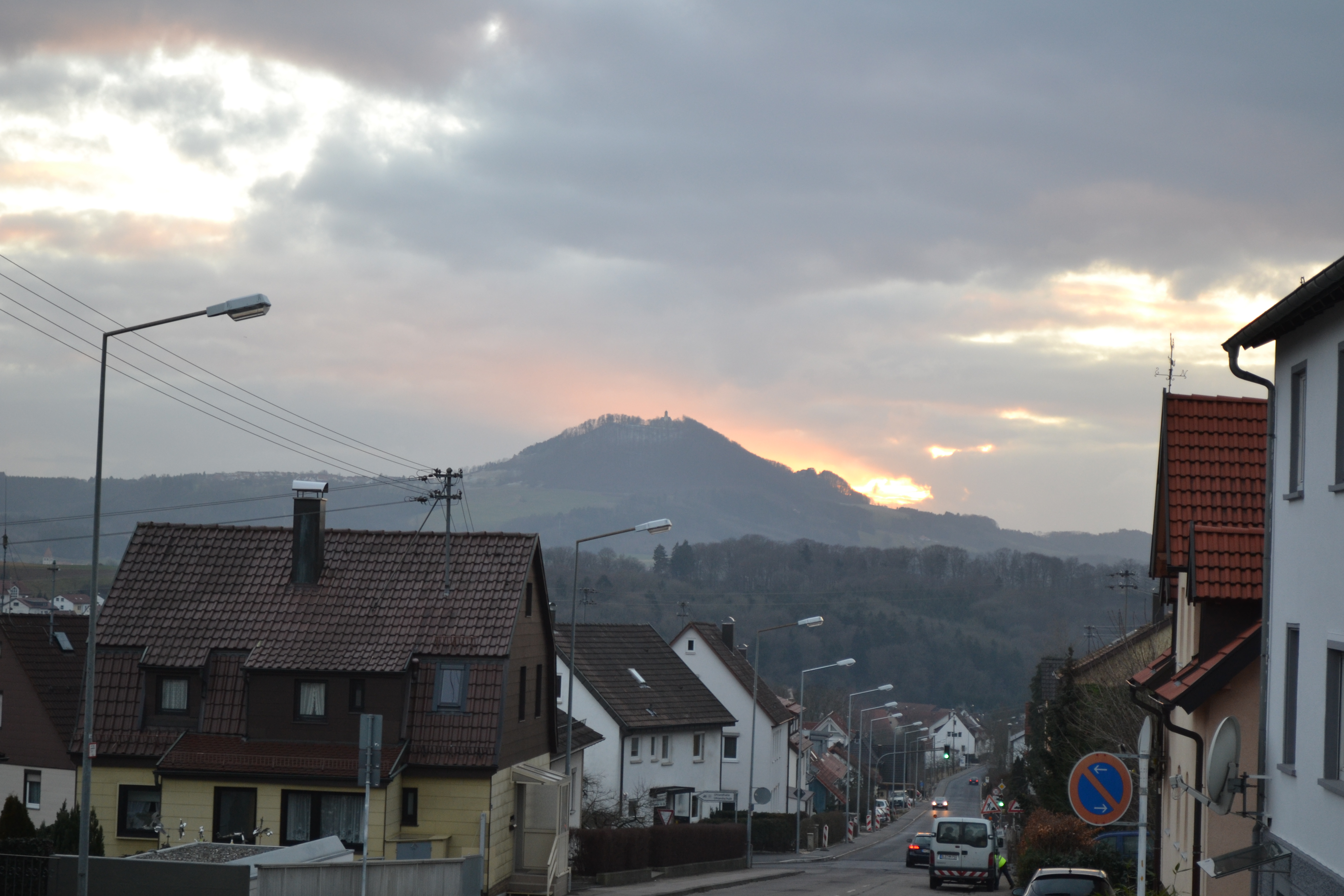 Blick auf den Rechberg von Bettringen aus